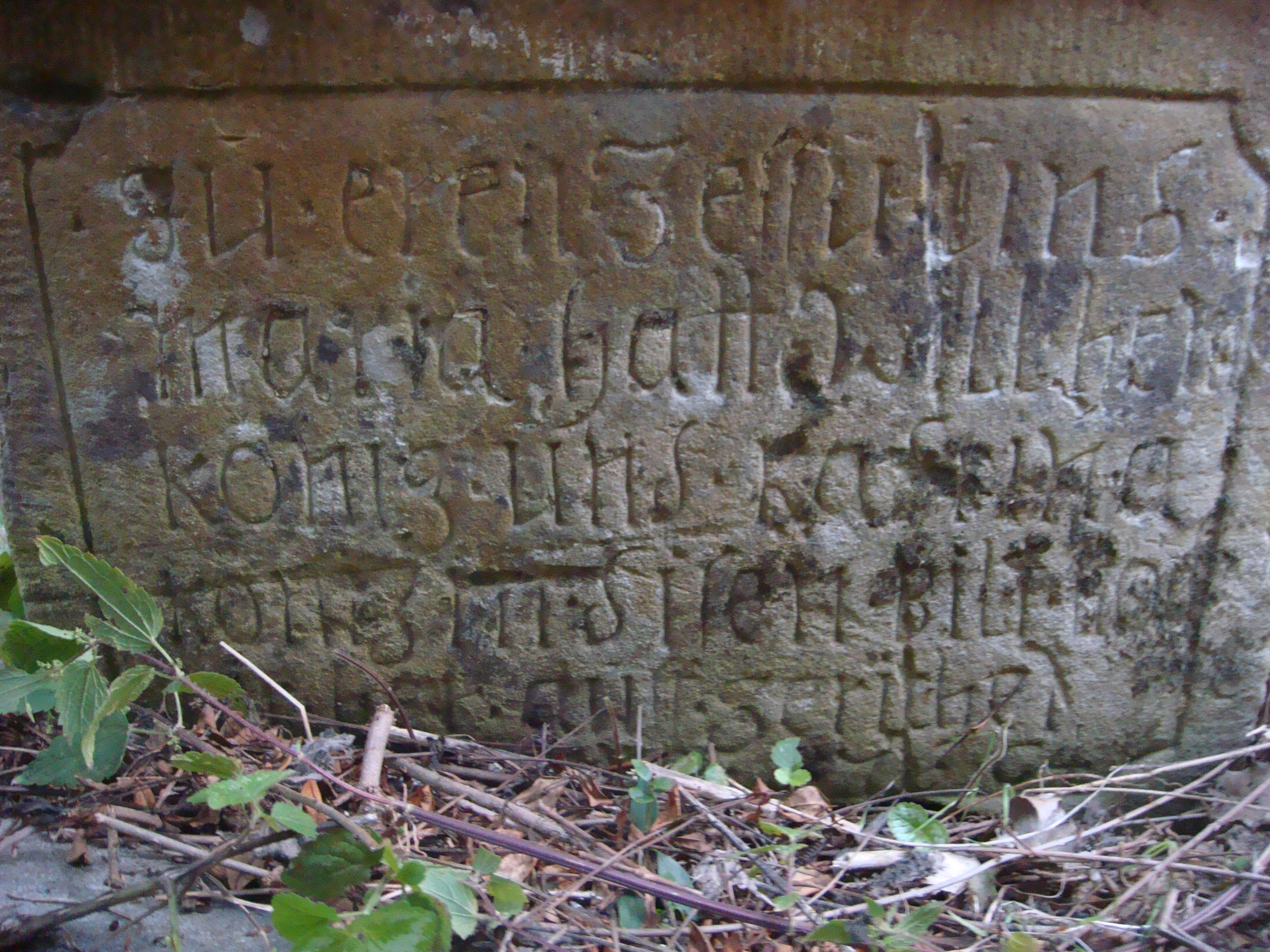 Original Bildstocksockel